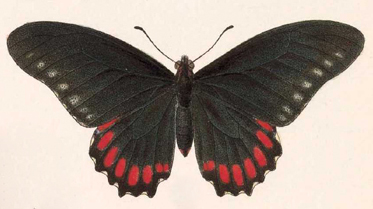 Papilio eridamas = Mimoides phaon phaon (Boisduval, 1836) (upperside)